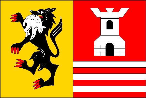 Vlajka obce Úsilov